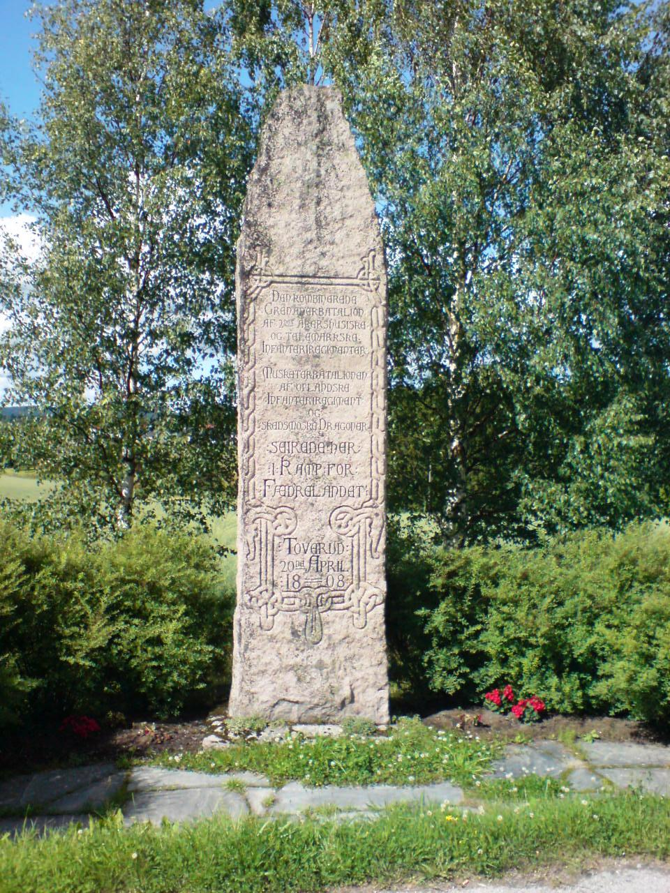 Toverudstøtta på Aurskog i Aurskog-Høland kommune.